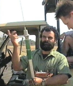 Greg Rasmussen in Hwange Park in 1996